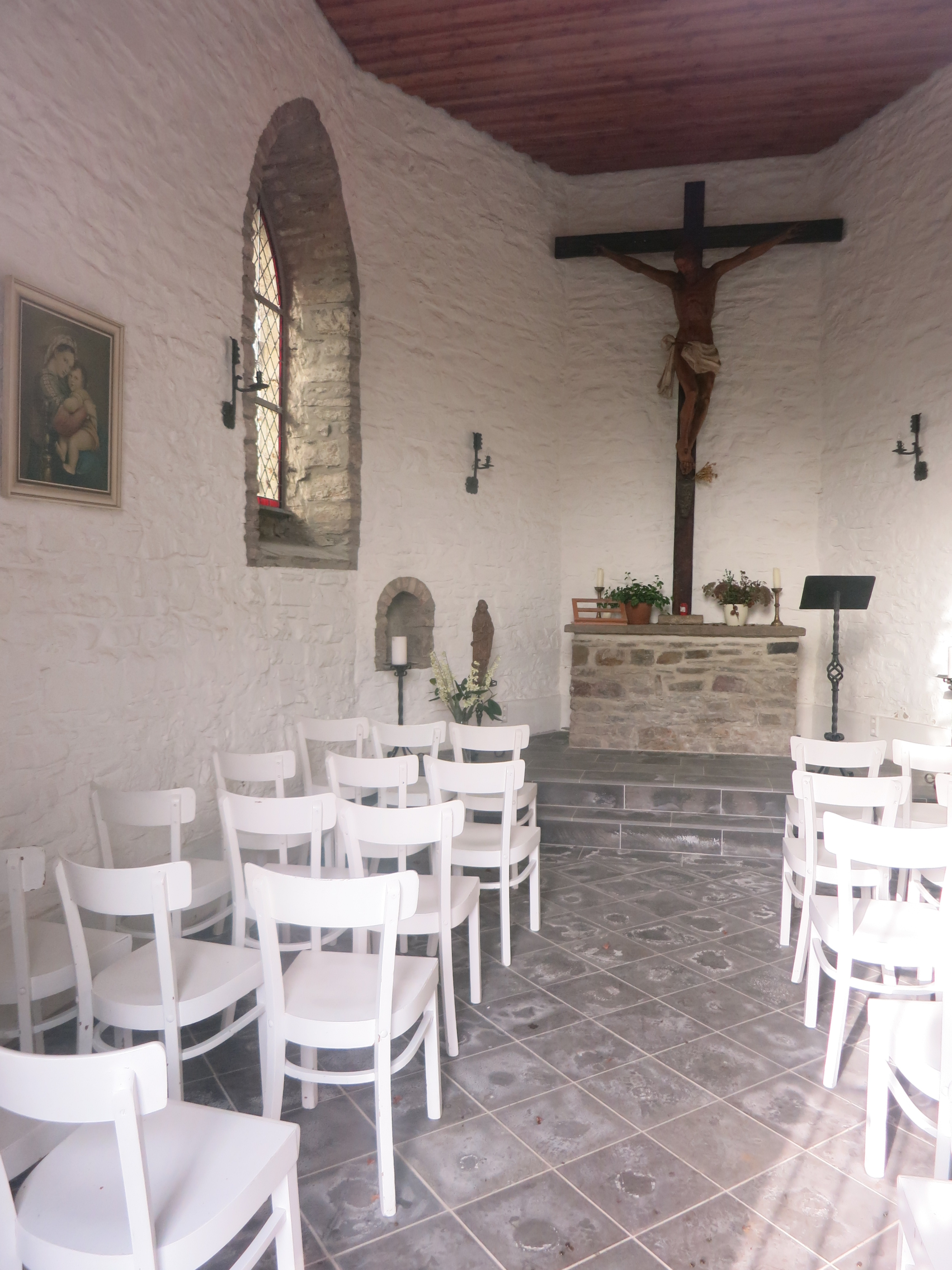 Blick durch das Fenster in die Kreuzkapelle Engelskirchen-Loope